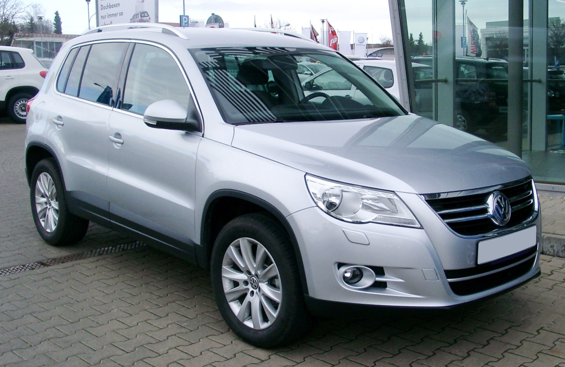 VW Tiguan